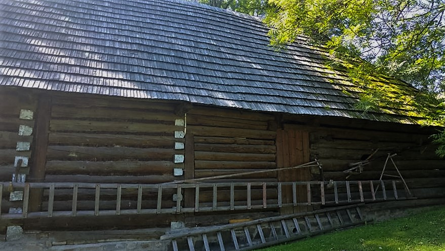 Zagroda Korkoszów w Czarnej Górze - filia Muzeum Tatrzańskiego im. dra T. Chałubińskiego w Zakopanem